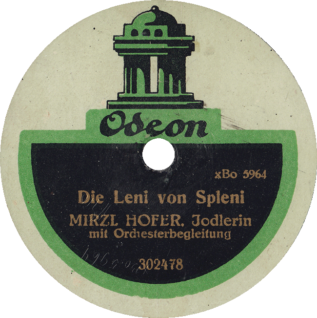 Platte Die Leni von Spleni von Mirzl Hofer, Jodlerin mit Orchesterbegleitung